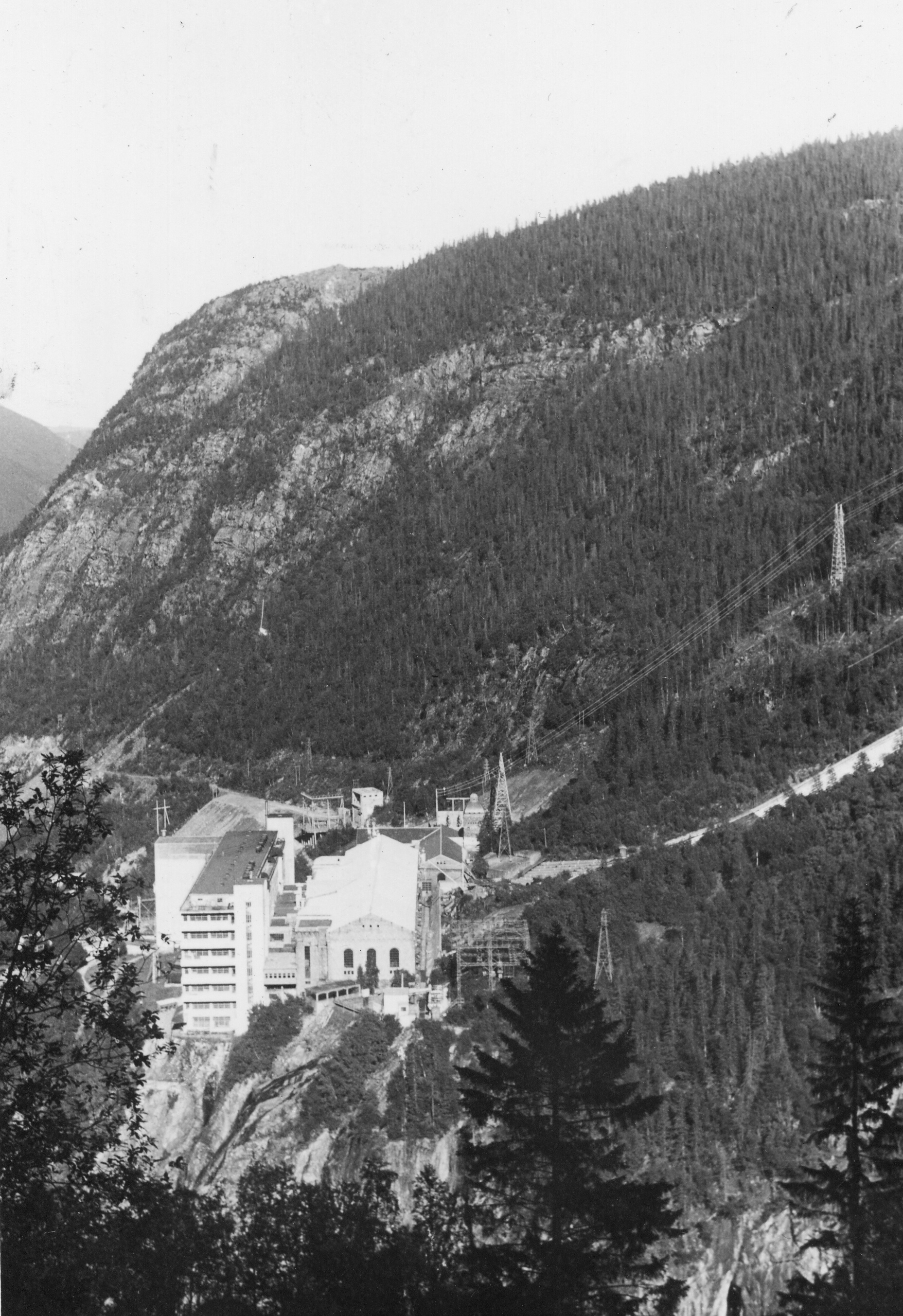 Vemork